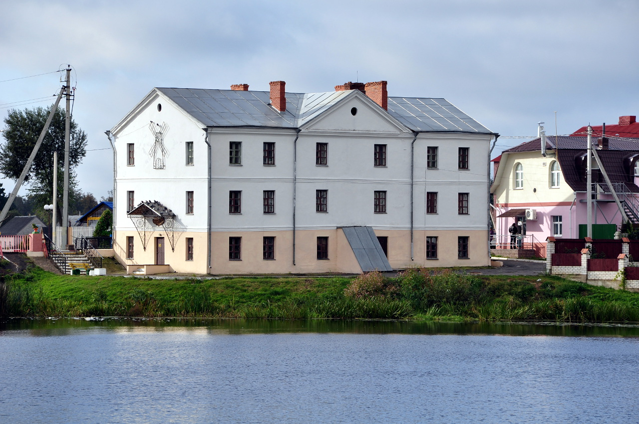 Беларуская (тарашкевіца): Будынак былога вадзянога млына. г. Паставы This is a photo of Belarusian heritage monument. Reference number: 212Г000572 ( WLM)